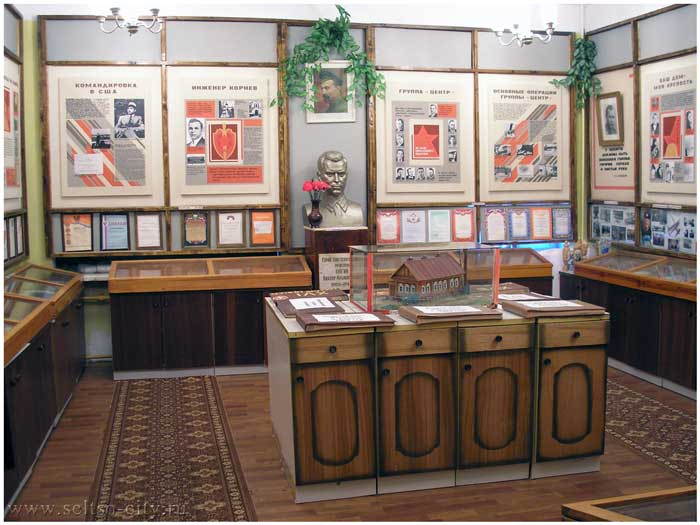 Музей м.Сільце Брянськ